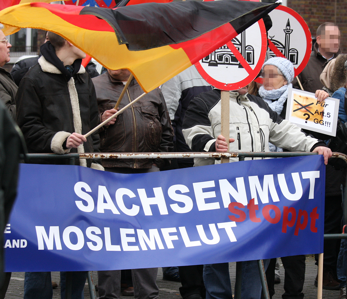 Transparent des Vereins „Arbeit Familie Vaterland“ von Henry Nitzsche, parteiloser Bundestagsabgeordneter